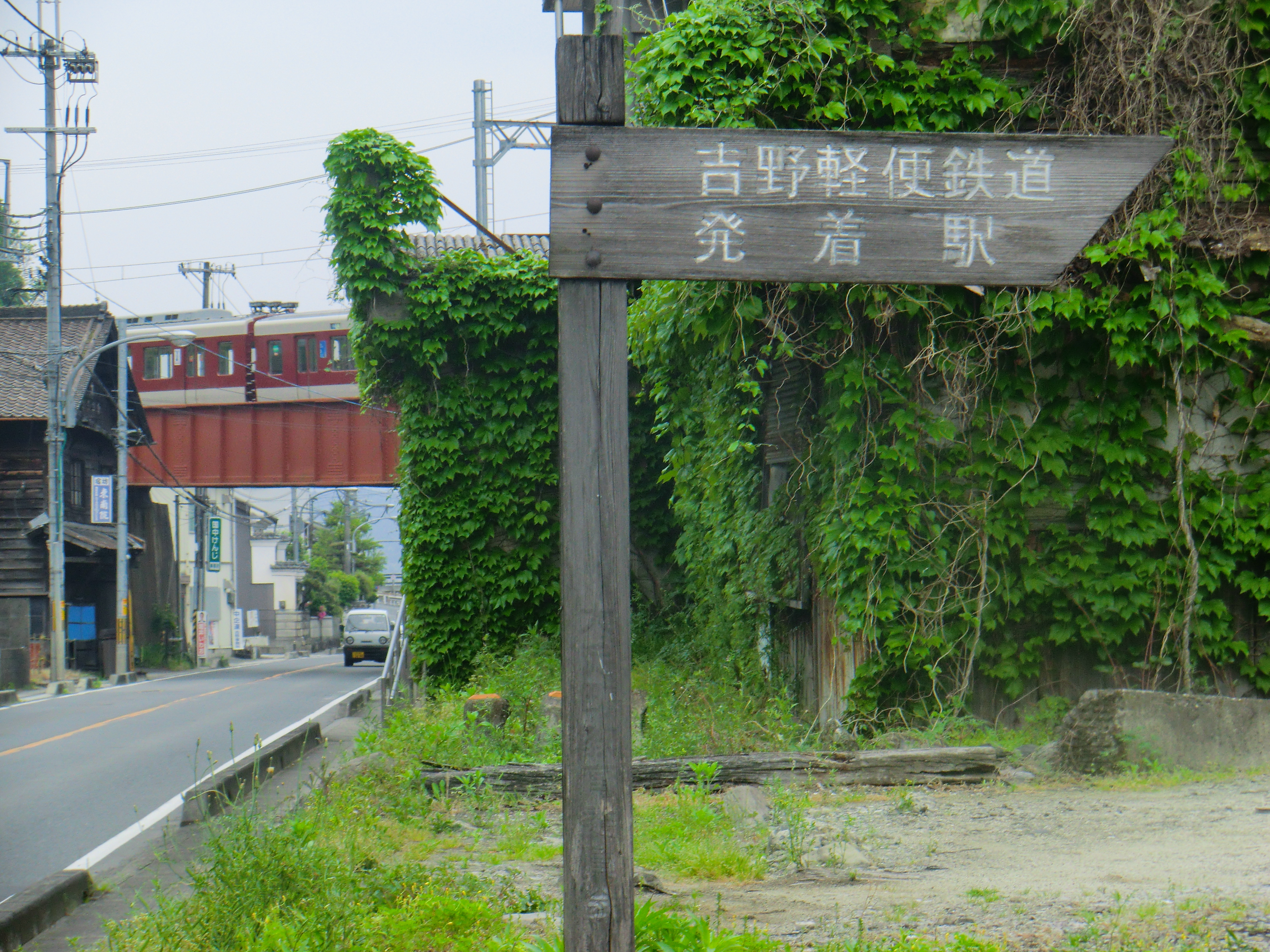 吉野軽便鉄道発着駅跡の木標 (大淀町北六田)